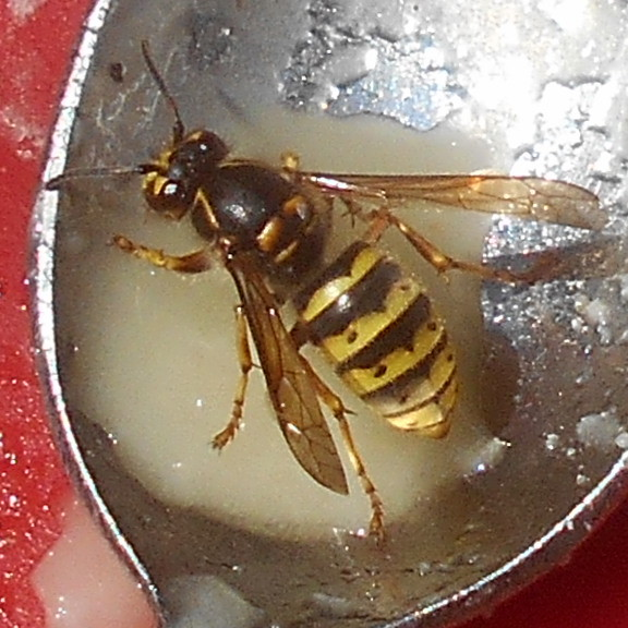 Dělnice vosy prostřední (Dolichovespula media) přilákaná na med